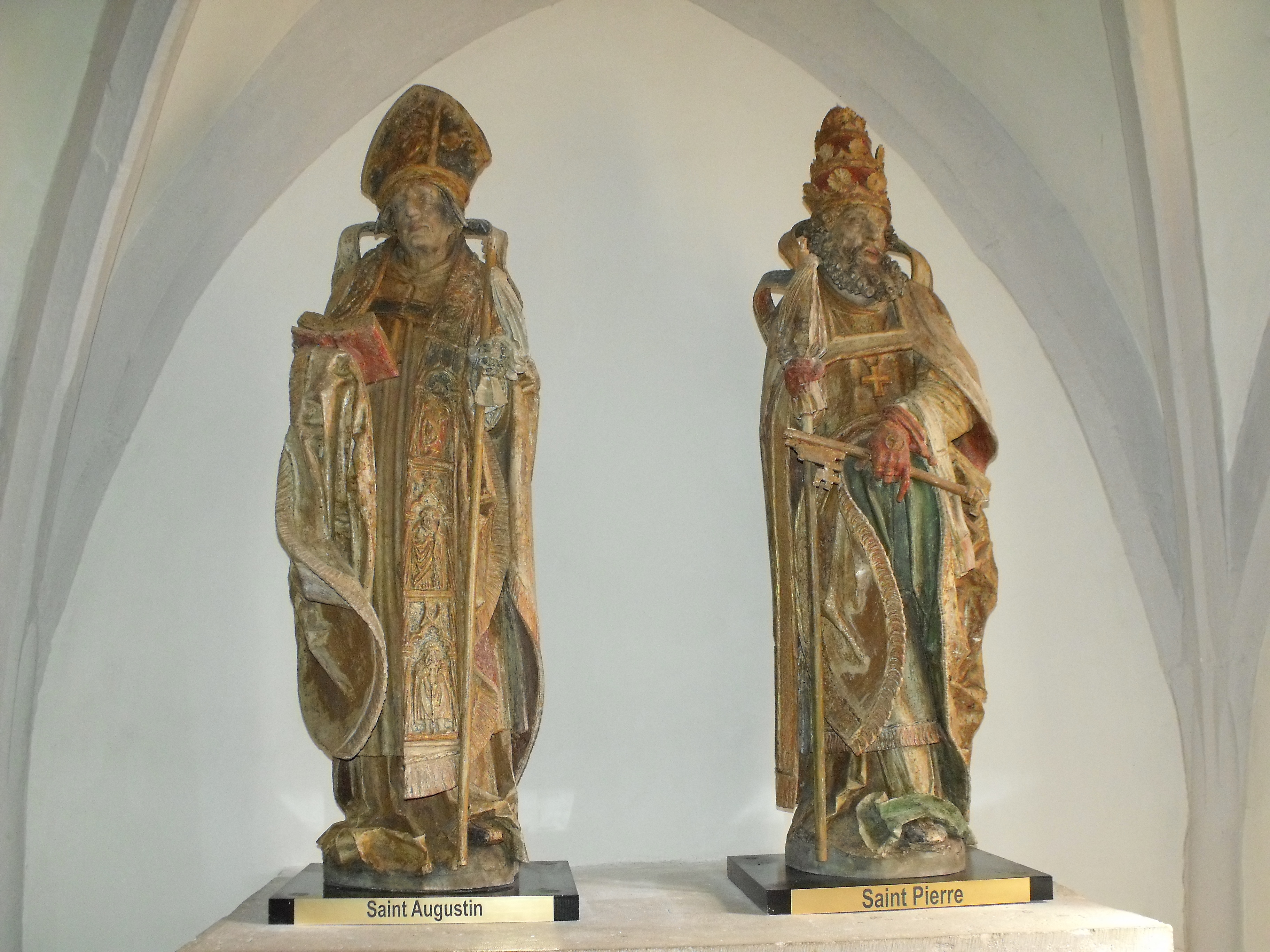 Église Saint-Léger de Chaux-lès-Châtillon : statues de Saint Augustin et Saint Pierre